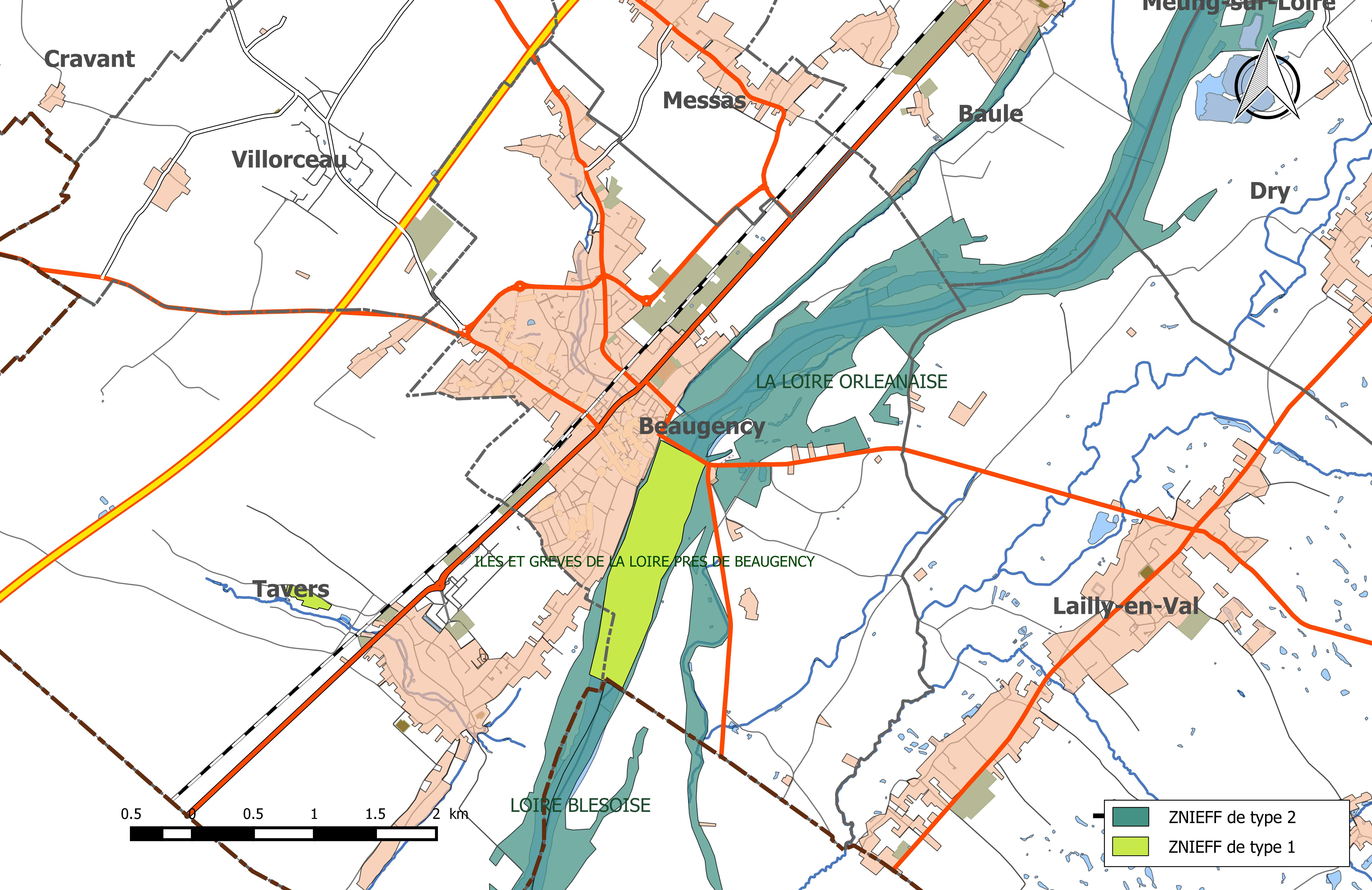 Carte des Zones naturelles d'intérêt écologique faunistique et Floristique (ZNIEFF) de la commune de Beaugency.